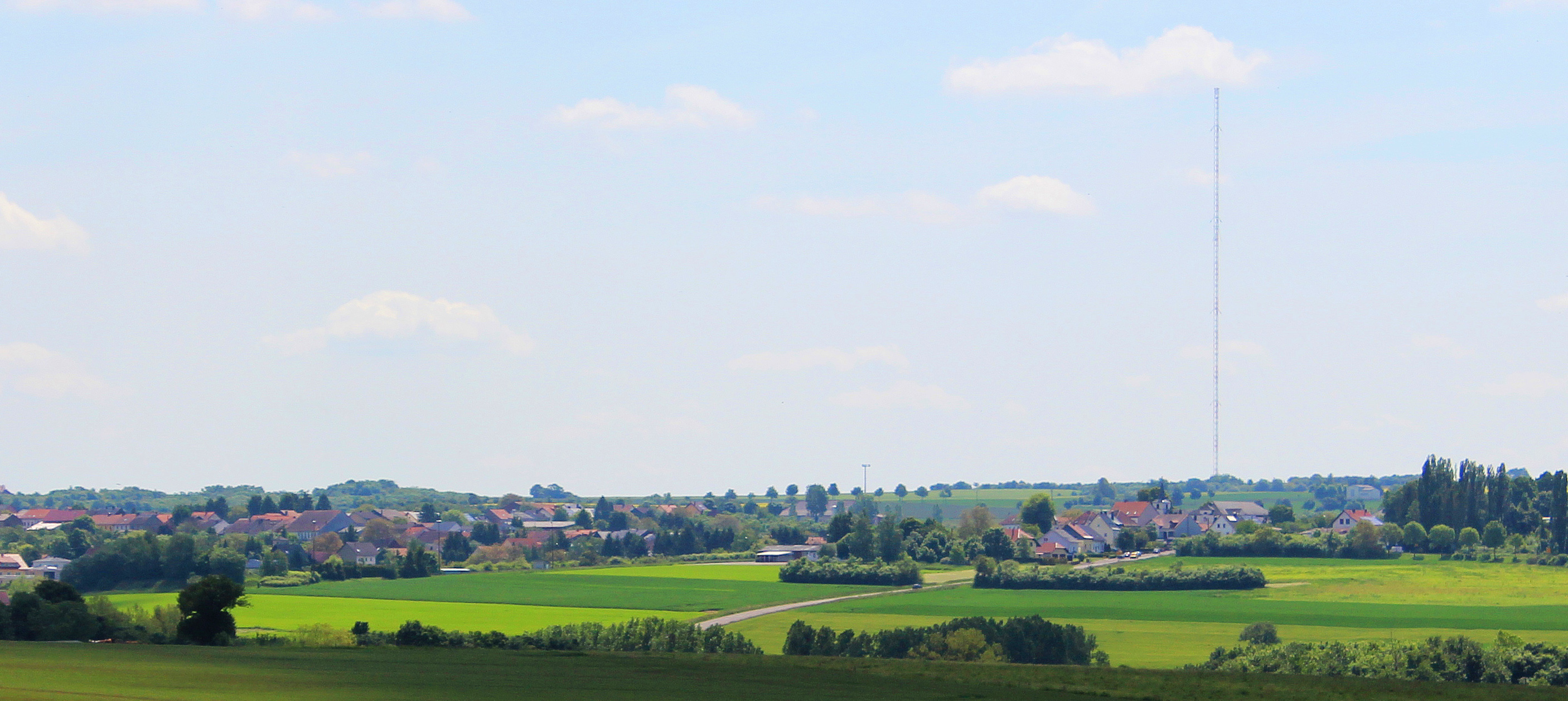 Blick auf Ittersdorf, Gemeinde Wallerfangen, Landkreis Saarlouis, Saarland